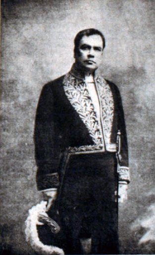 Félix Rubén García Sarmiento, conocido como Rubén Darío (Metapa, hoy Ciudad Darío, Matagalpa, 18 de enero de 1867 - León, 6 de febrero de 1916), fue un poeta nicaragüense, máximo representante del Modernismo literario en lengua española. Es posiblemente el poeta que ha tenido una mayor y más duradera influencia en la poesía del siglo XX en el ámbito hispánico. Es llamado príncipe de las letras castellanas.